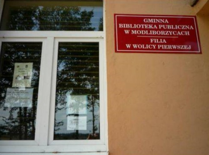 Tablica przed wejściem do Filii Gminnej Biblioteki w Wolicy Pierwszej mieszczącej się w budynku Publicznej Szkoły Podstawowej w Wolicy Pierwszej.